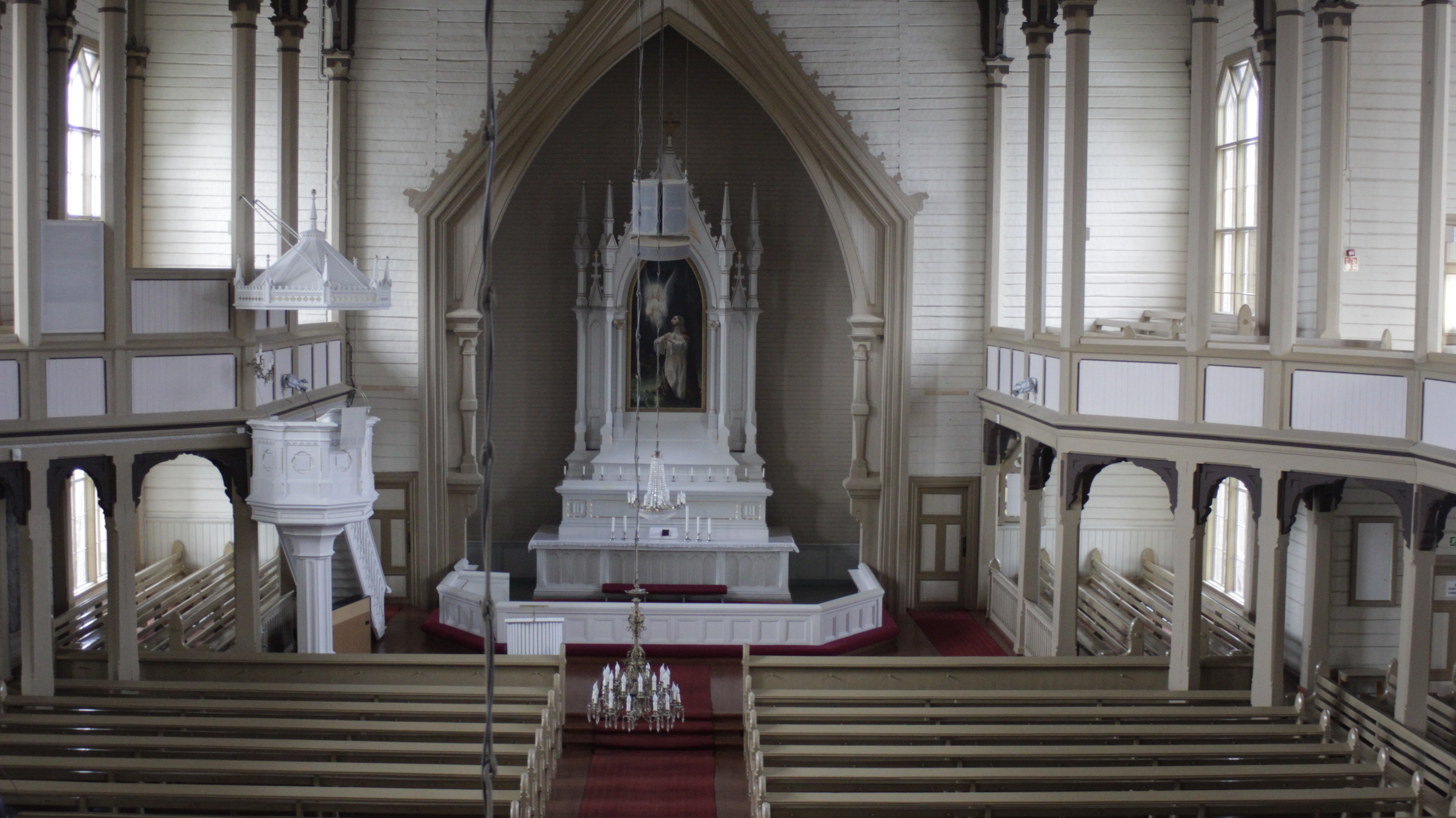 Heinäveden kirkon kirkkosalia talvella 2017